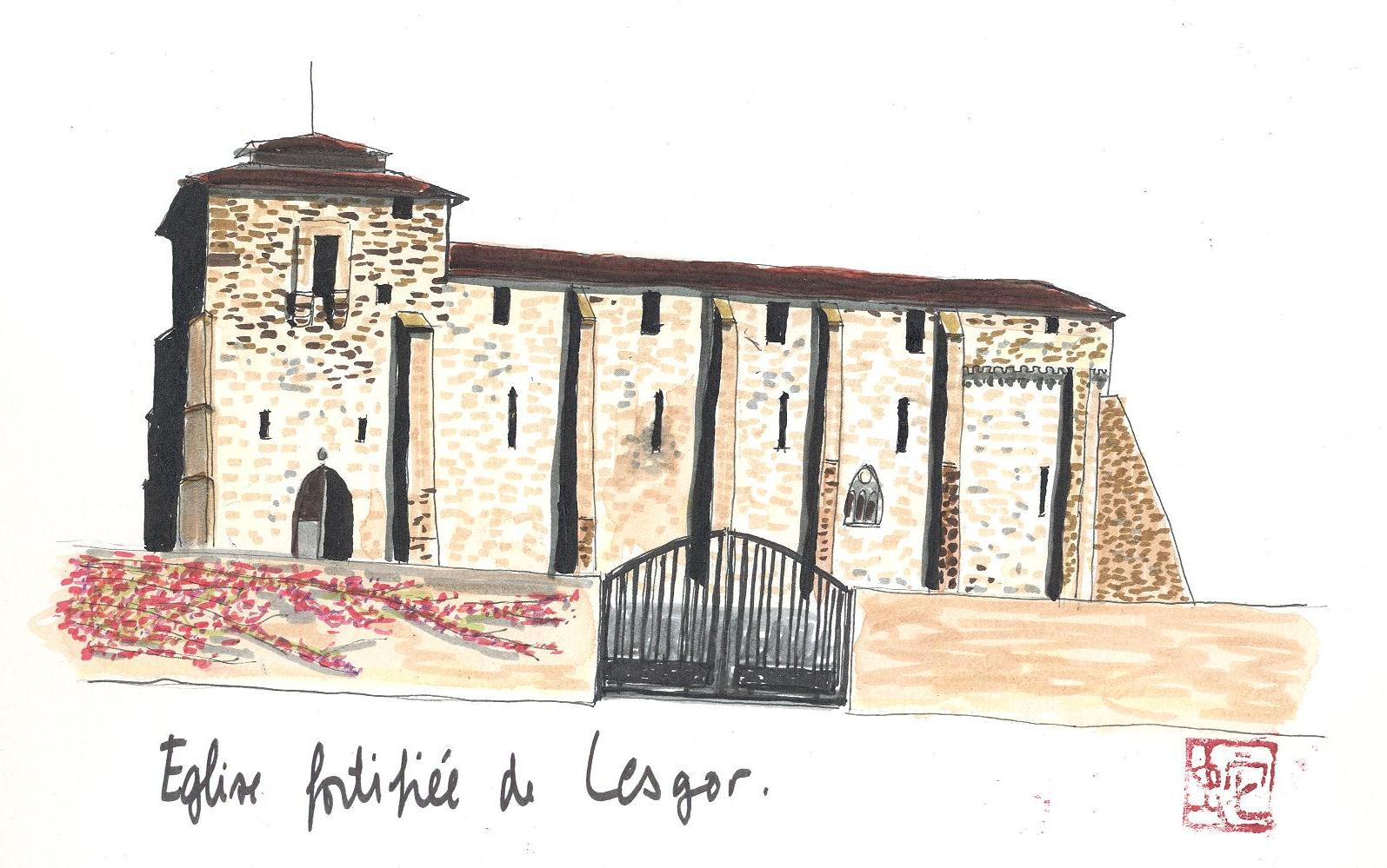 Aquarelle de l'église fortifiée de Lesgor dans le département français des Landes.